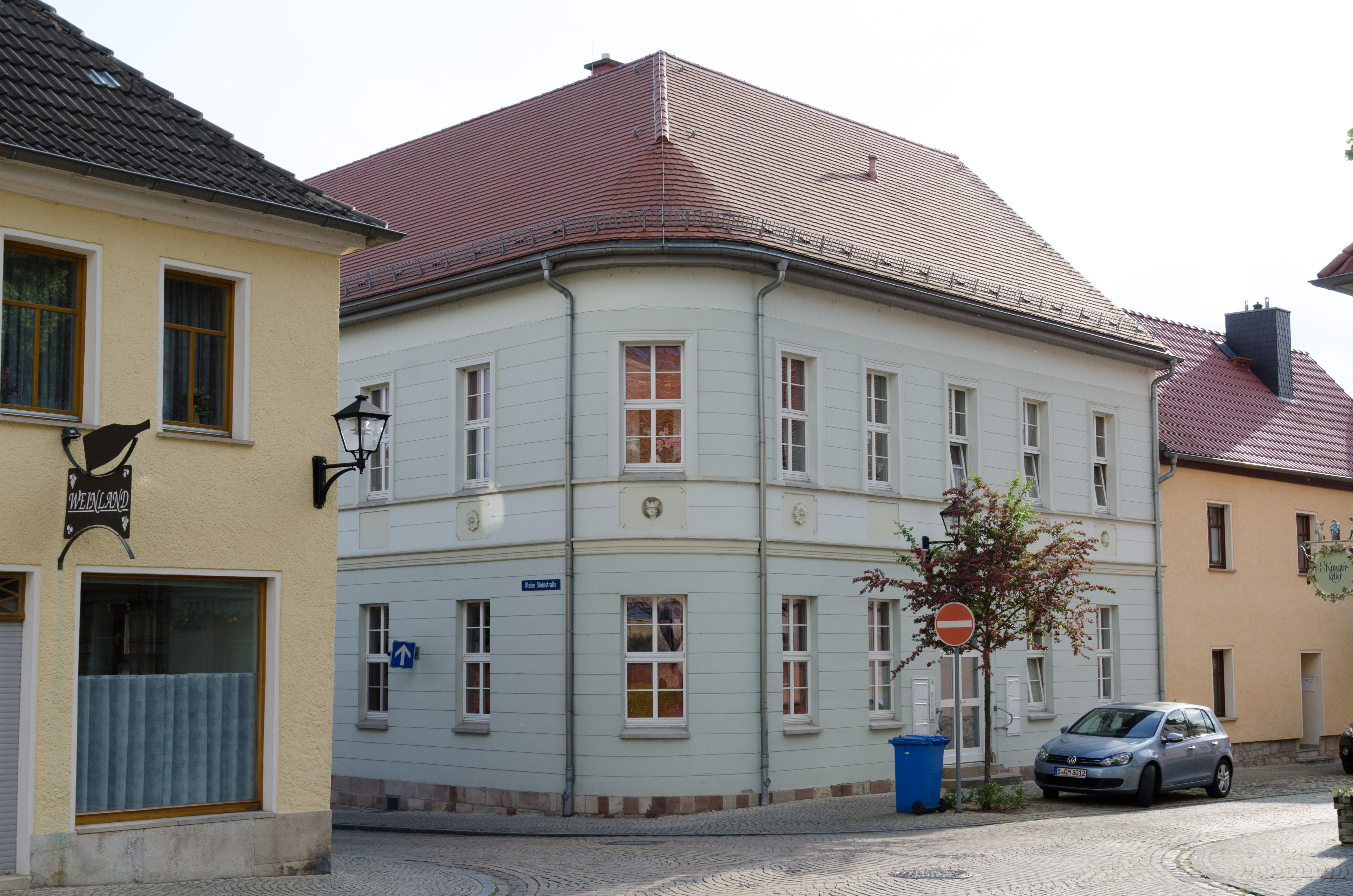 Freyburg an der Unstrut, Steinstraße 9